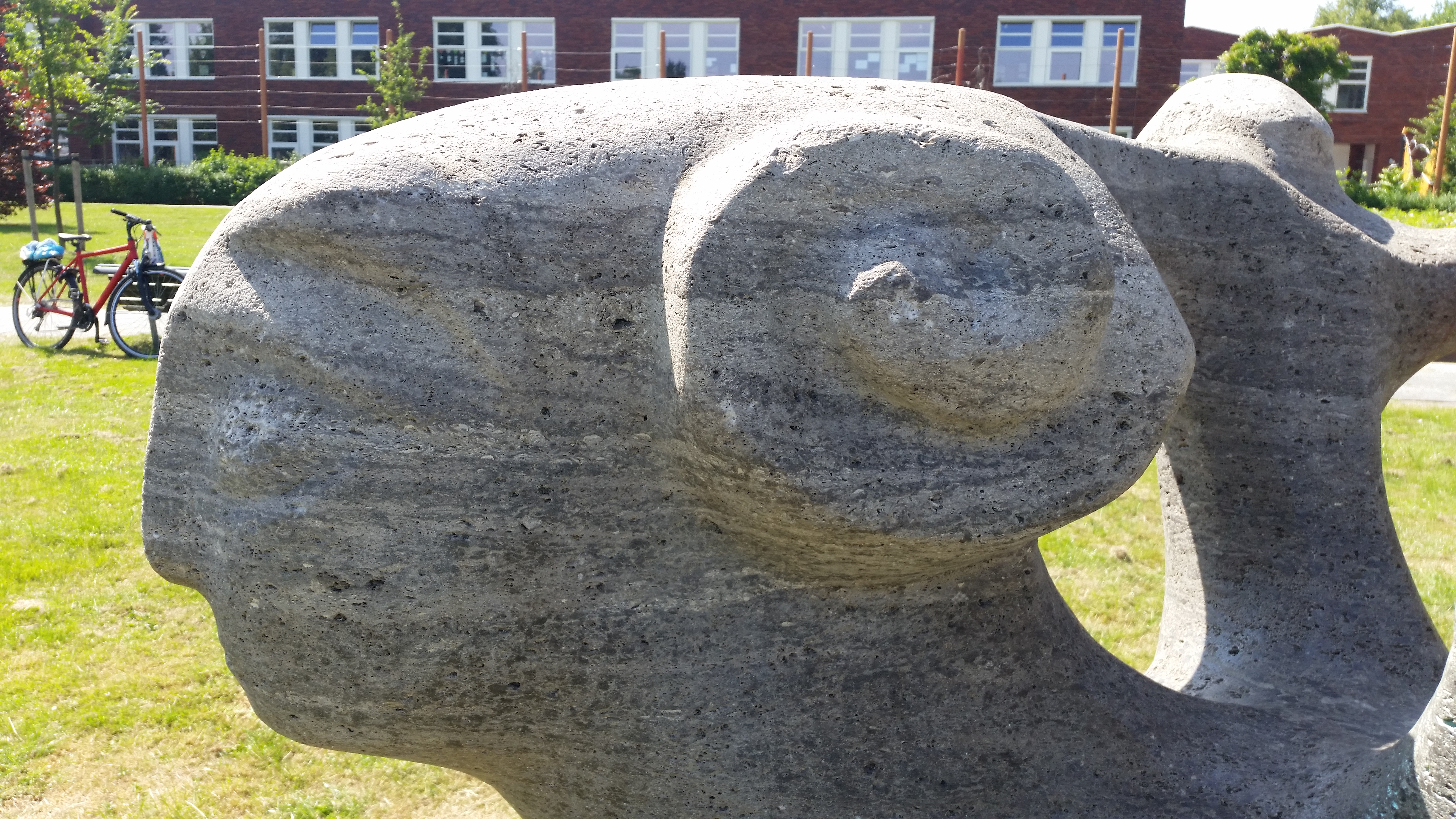 Het beest (Nel van Lith), de kop van de ene kant